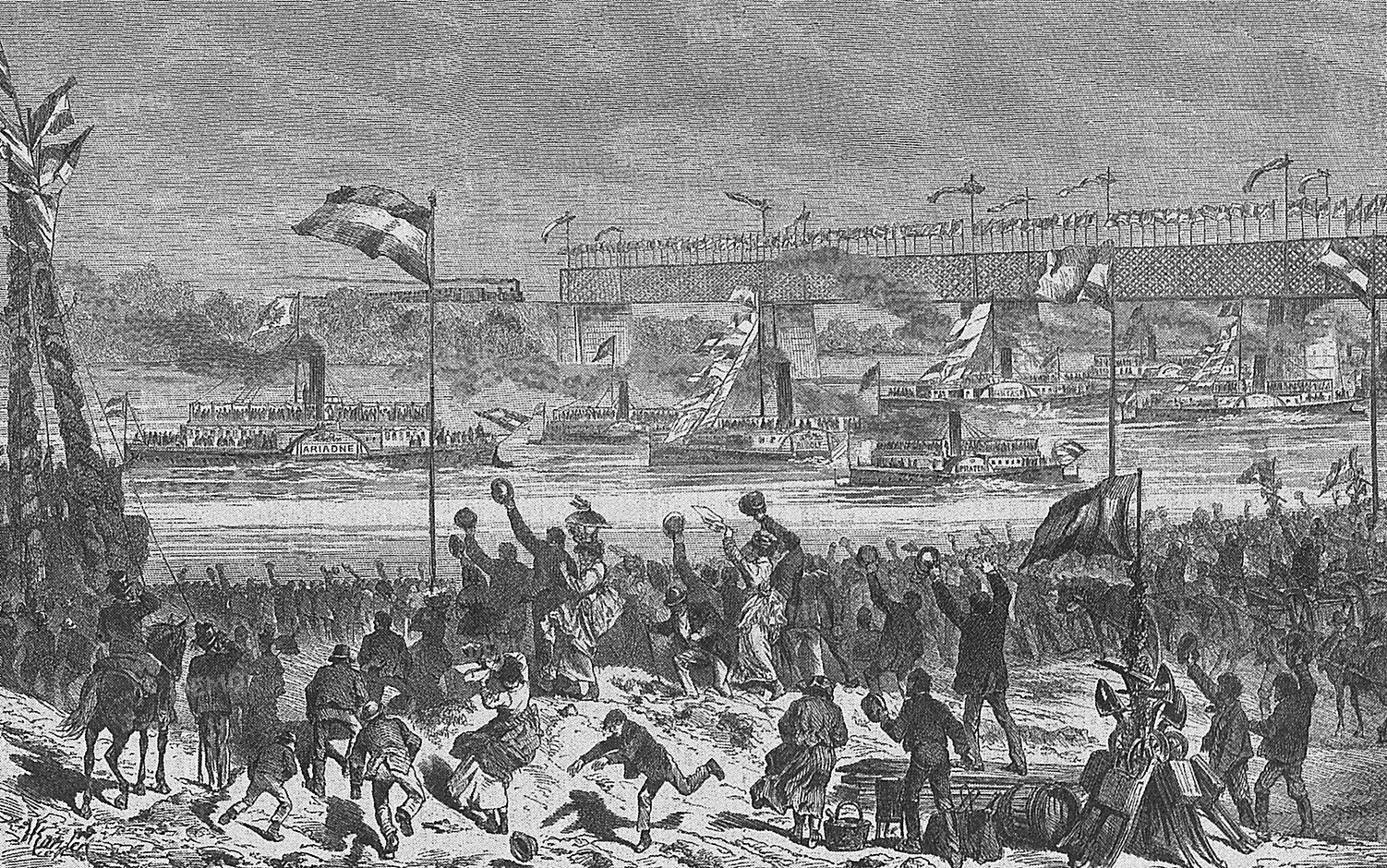 Eröffnung der Donauregulierung 1875 in Wien